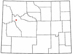 Wyoming map, dot on Dubois